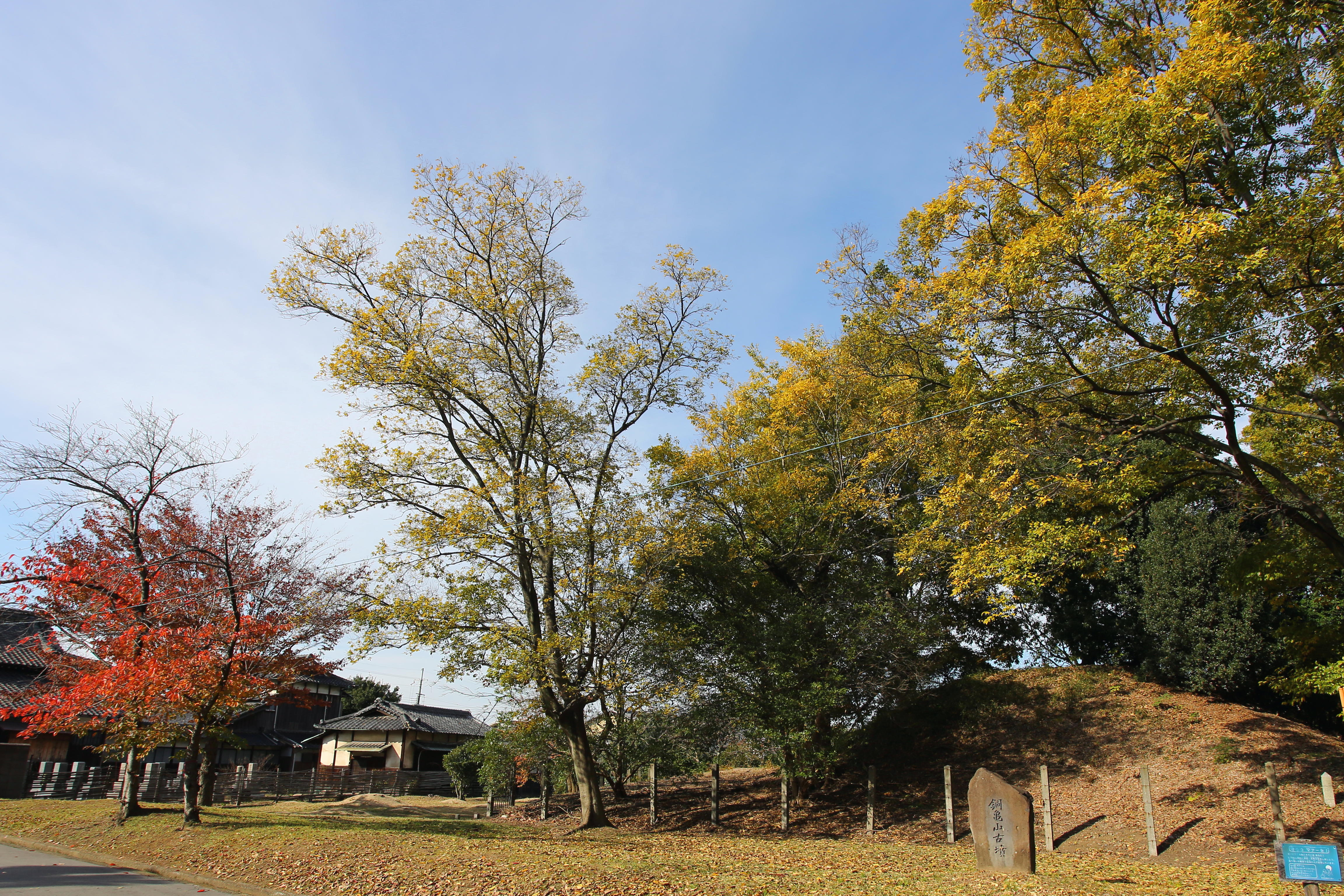 銅亀山古墳３ 秋の風景